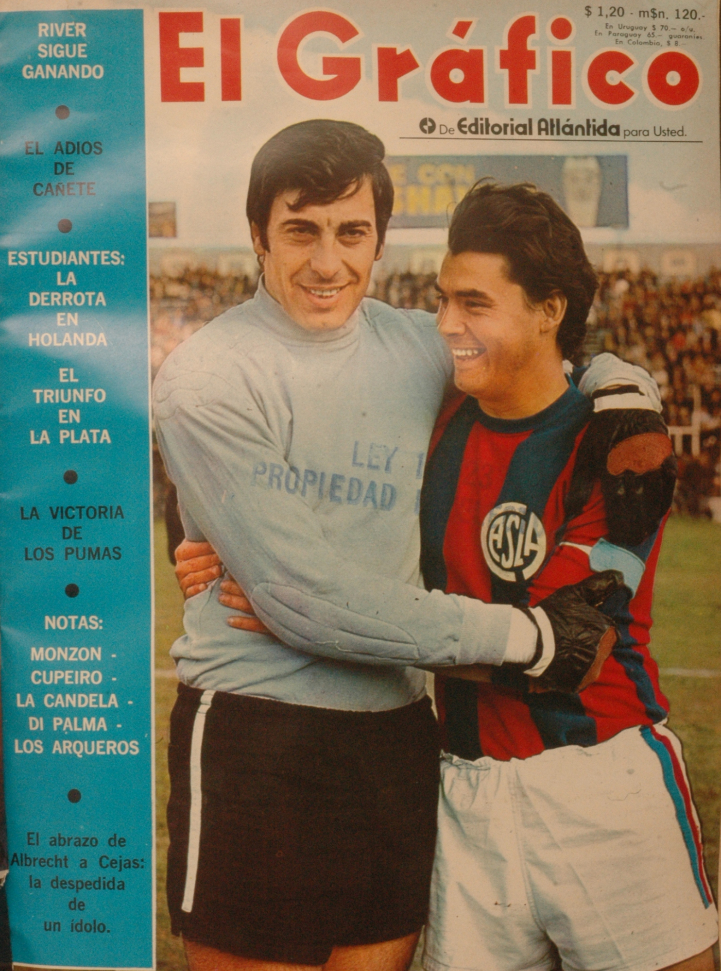 El Grafico del 15 de Septiembre de 1970. Edicion 2658